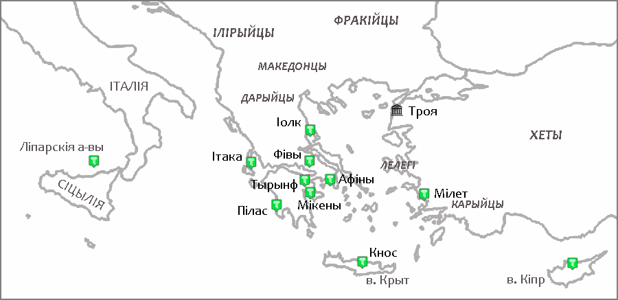 Распаўсюджанне Мікенскай цывілізацыі